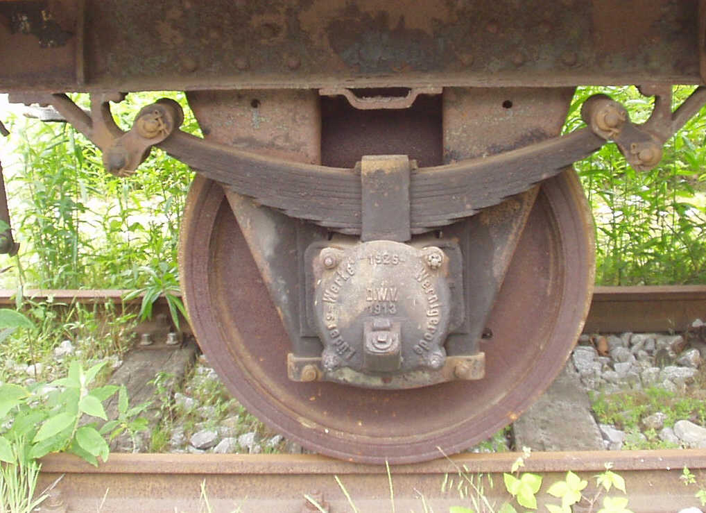 Federung Wagenrad mit Blattfeder (Essen Zollverein)